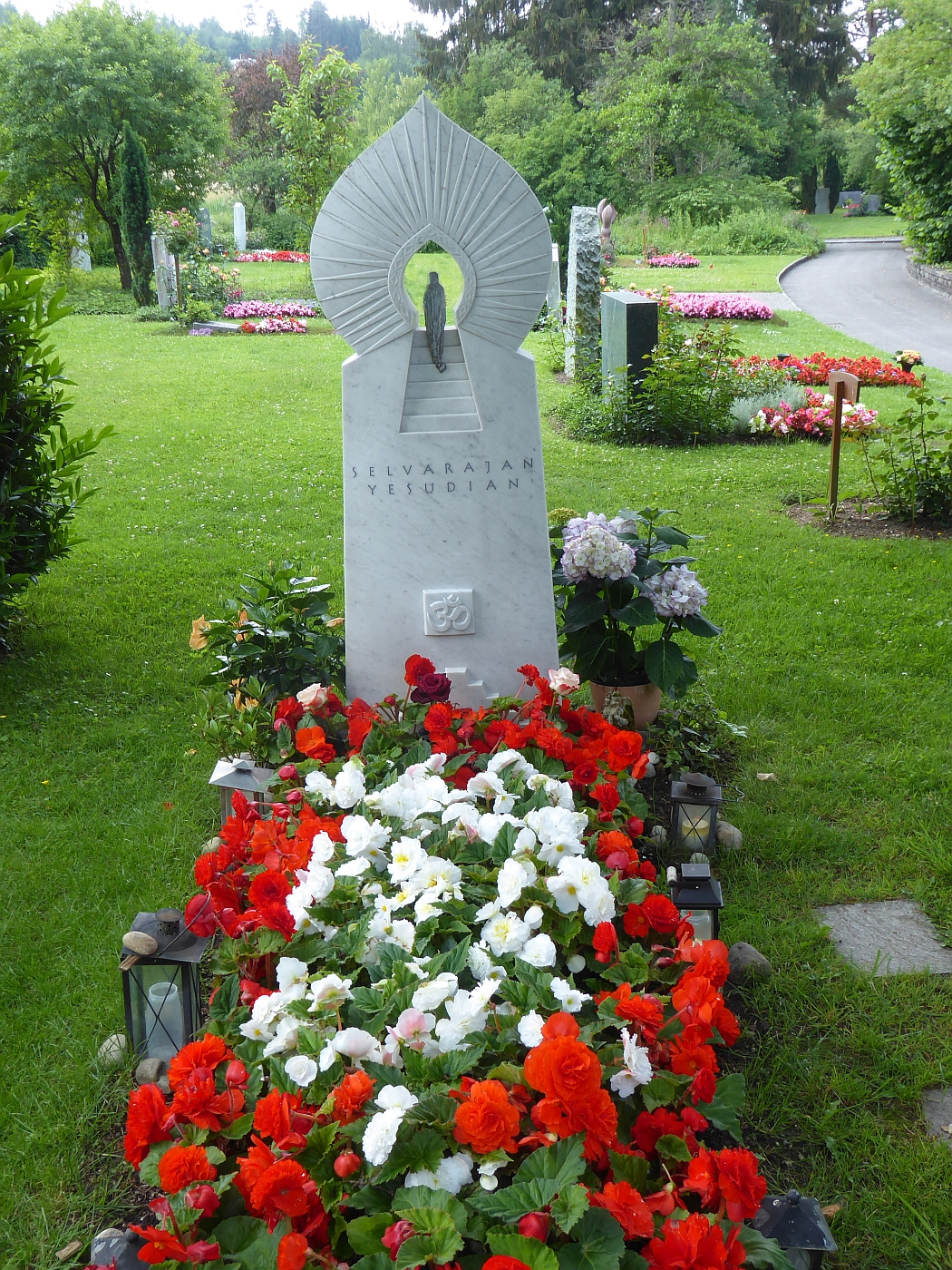 Selvarajan Yesudian (1916–1998) Yoga-Lehrer, Gründer von Yoga Schulen, Autor von Yoga Bücher. Grab auf dem Friedhof Witikon, Zürich